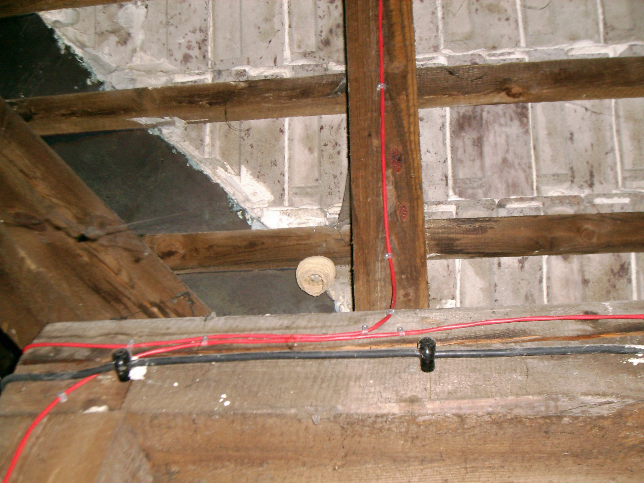 Belki impregnowane Xylamitem w 1977 r.